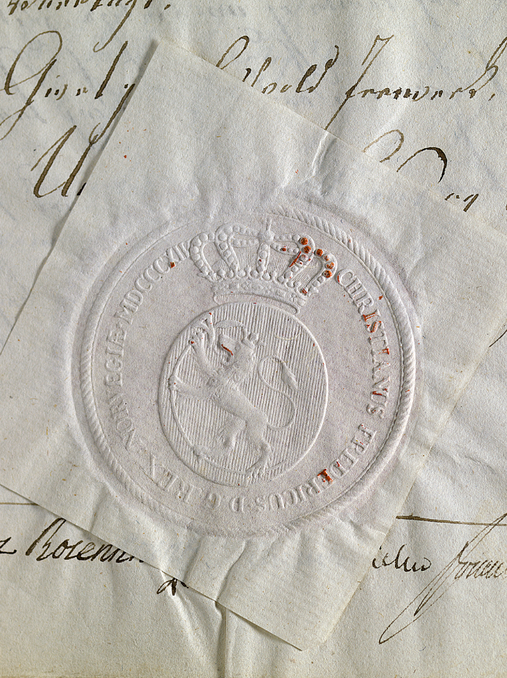 Avtrykk av Christian Frederiks kongesegl, brukt på kunngjøringen om kongevalget 19. mai 1814